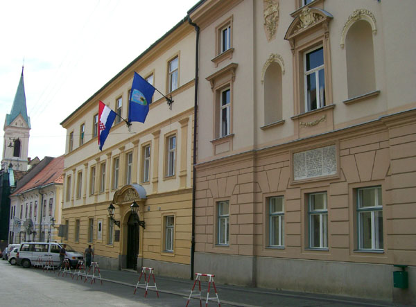 Starogradska vijećnica (Zgrada Skupštine Grada Zagreba)